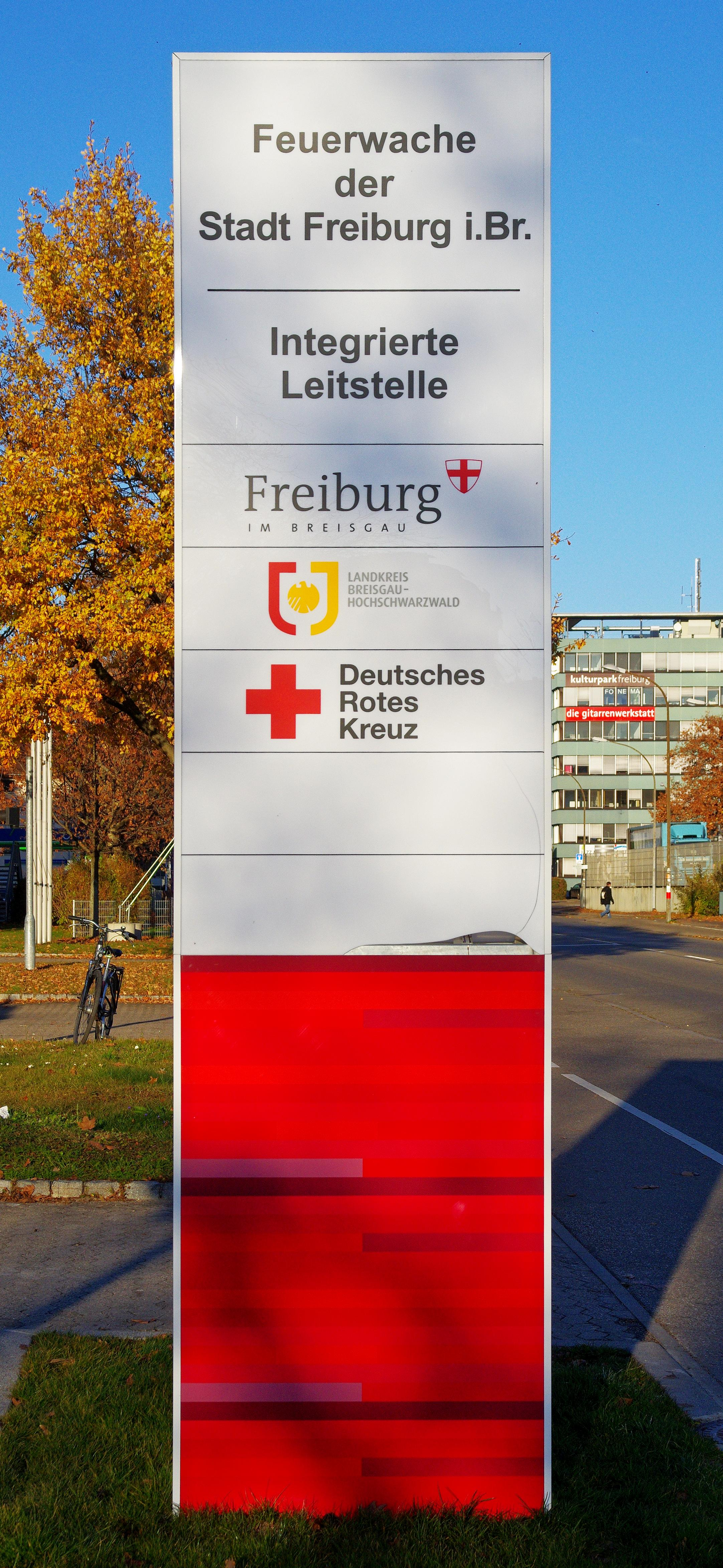 Feuerwache Freiburg mit dem neuen Anbau dort ist auch die Integrierte Leitstelle der Stadt Freiburg und des DRK untergebracht